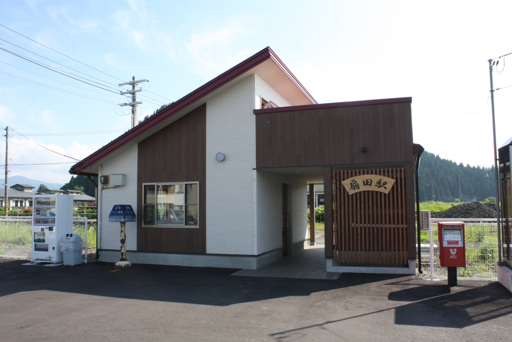 JR花輪線 扇田駅駅舎